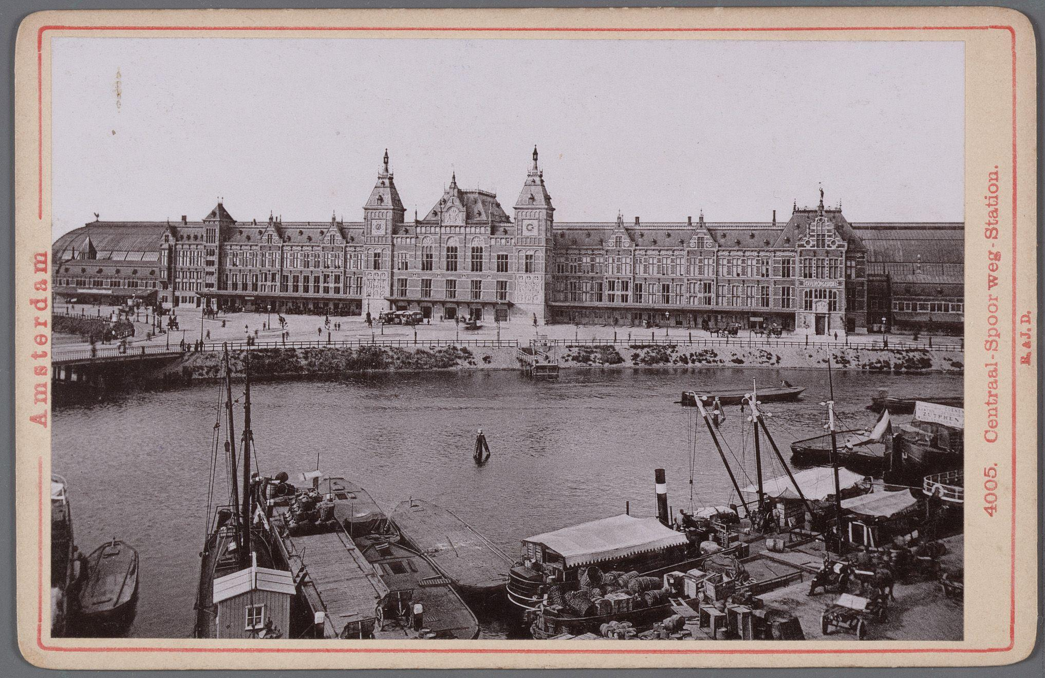 Beschrijving Centraal Station gezien vanaf de Prins Hendrikkade met op de voorgrond het Open Havenfront Documenttype foto Vervaardiger Catz, E. (uitgever) Römmler und Jonas Collectie Collectie Stadsarchief Amsterdam: kabinetfoto's Datering 1890 Geografische naam Open Havenfront Stationsplein Gebouw Centraal Station Inventarissen Afbeeldingsbestand 010005000555